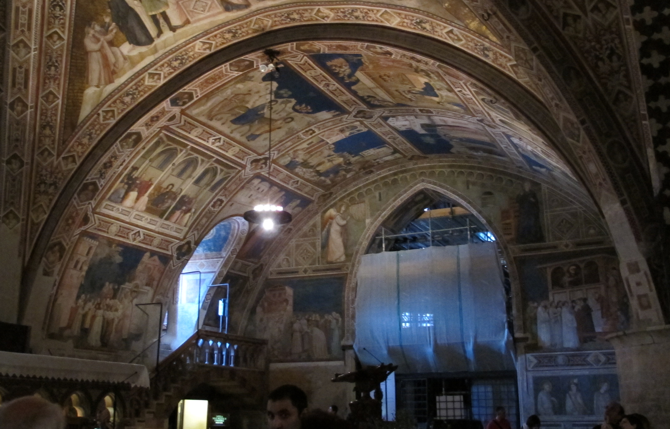 Copia di transetto destro della basilica inferiore di Assisi 001